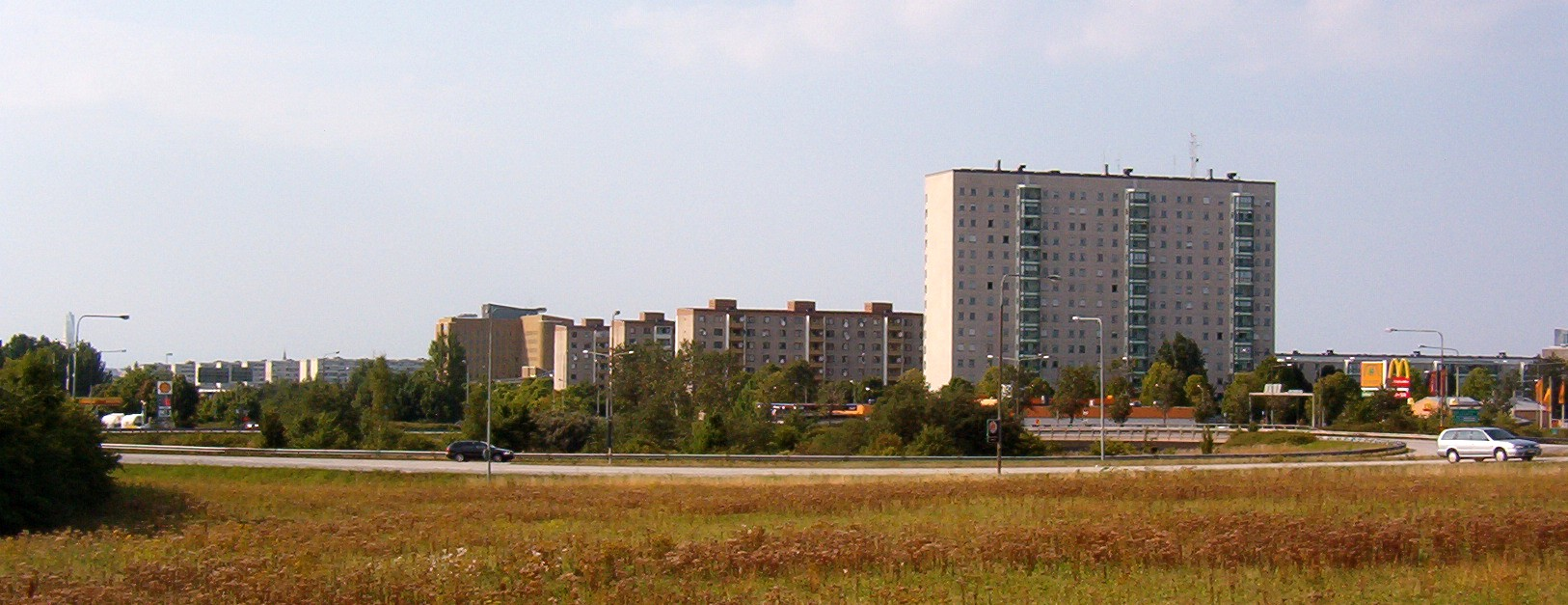 Stadsdelen Rosengård i (östra) Malmö I förgrunden syns inre Ringvägen. Till vänster om fotografen ligger Västra Skrävlinge kyrka, till höger ligger området Höja, bakom honom ligger Almgården.